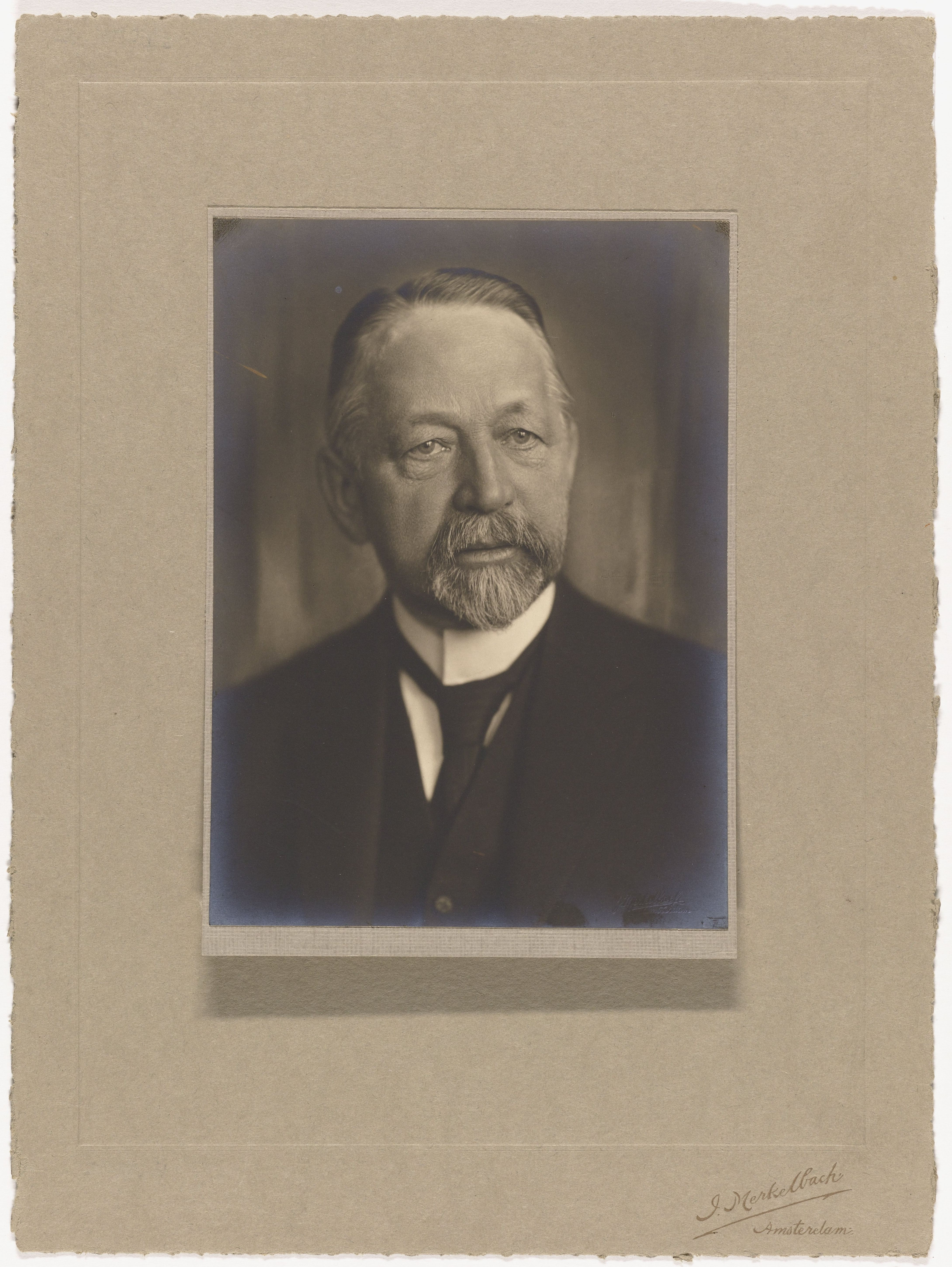 IdentificatieTitel(s): Andries Bonger op middelbare leeftijdObjecttype: foto Objectnummer: RP-F-00-1433VervaardigingVervaardiger: fotograaf: Jacob MerkelbachDatering: 1930 - 1936Fysieke kenmerken: papier op kartonMateriaal: papier fotopapier karton Techniek: ontwikkelgelatinezilverdrukAfmetingen: foto: h 156 mm × b 214 mmOnderwerpWat: historical person (BONGER, Andries) - historical person (BONGER, Andries) portrayed aloneWie: Andries BongerVerwerving en rechtenCredit line: Legaat van de heer S. CrommelinVerwerving: legaat 1985Copyright: Publiek domein